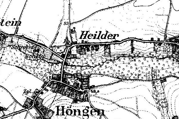 Neuaufnahme 1891 -1912